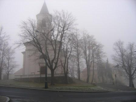 Kostel sv. Fabiána s Šebestiána a bývalá škola v Liboci ve starosvětském nádechu.